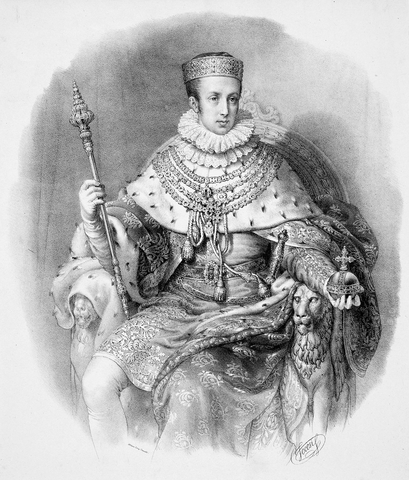 Ferdinando I incoronato re del Lombardo-Veneto